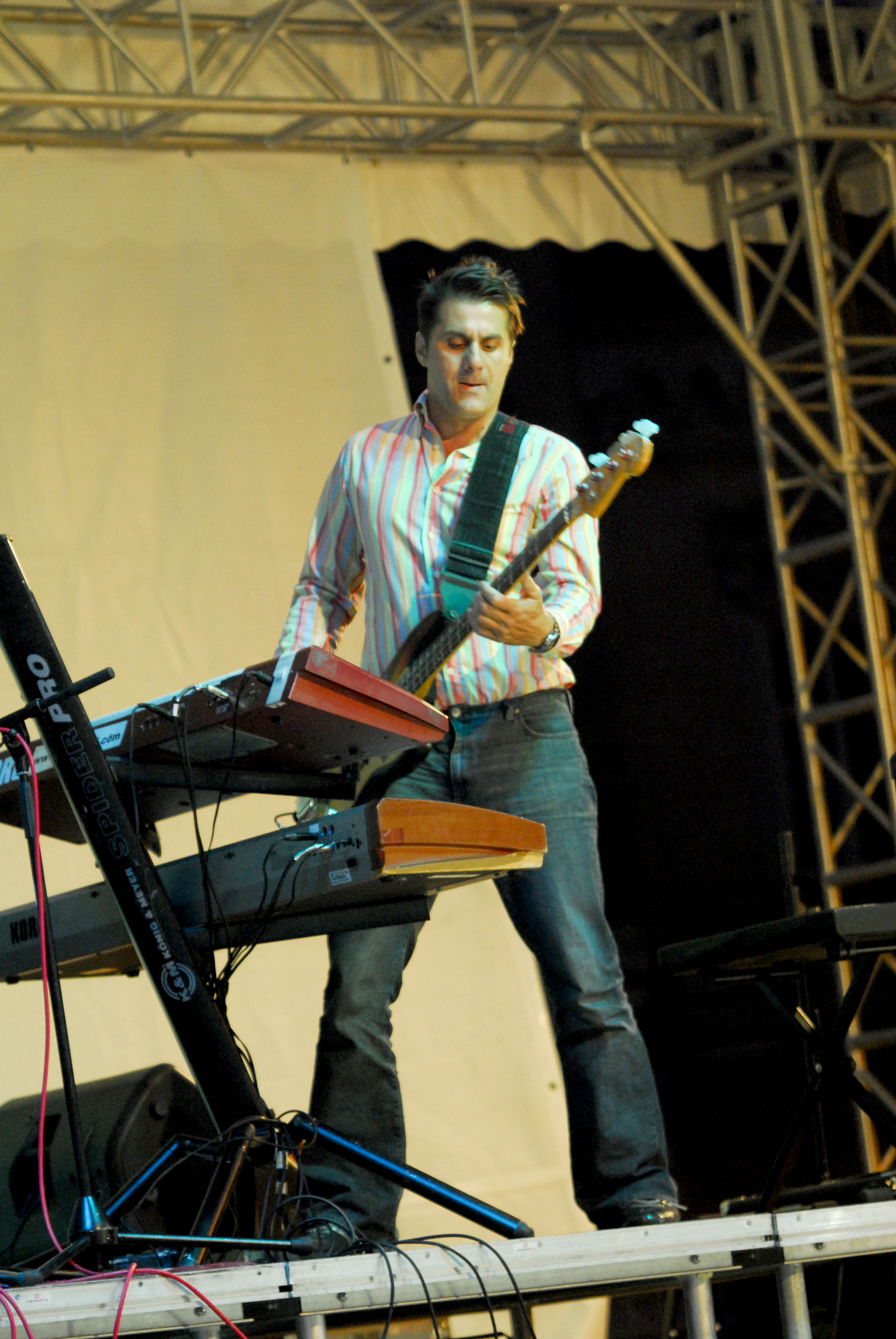 Marian Ionescu de la Directia 5 in concert la Brasov, in a 3-a zi de campanie a Umbrelei Verzi.